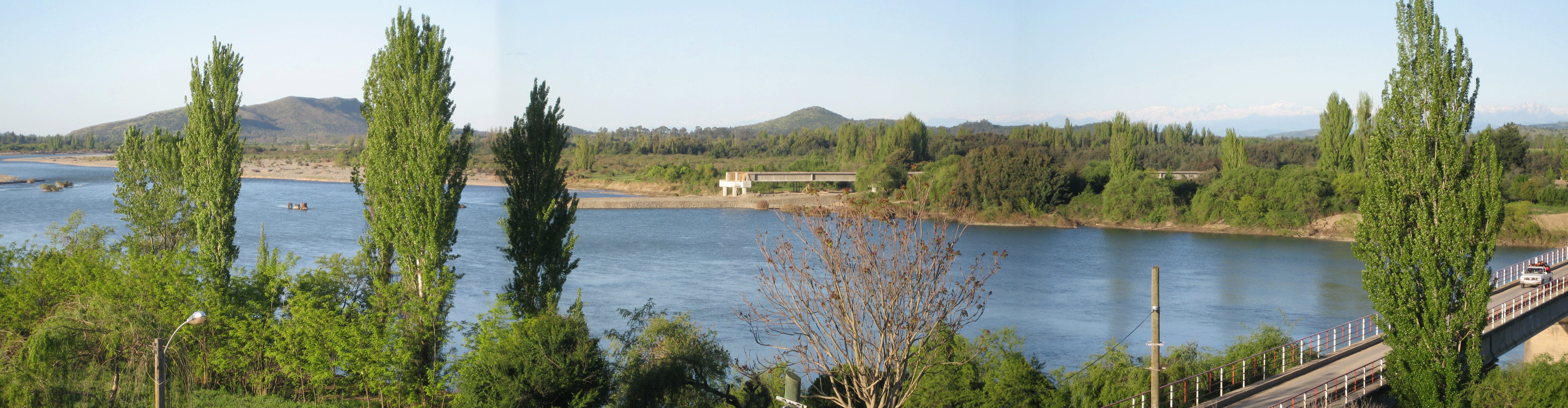 Chile, Linares, Rio Loncomilla. Puente Sifon y , al lado, el nuevo puente en construccion